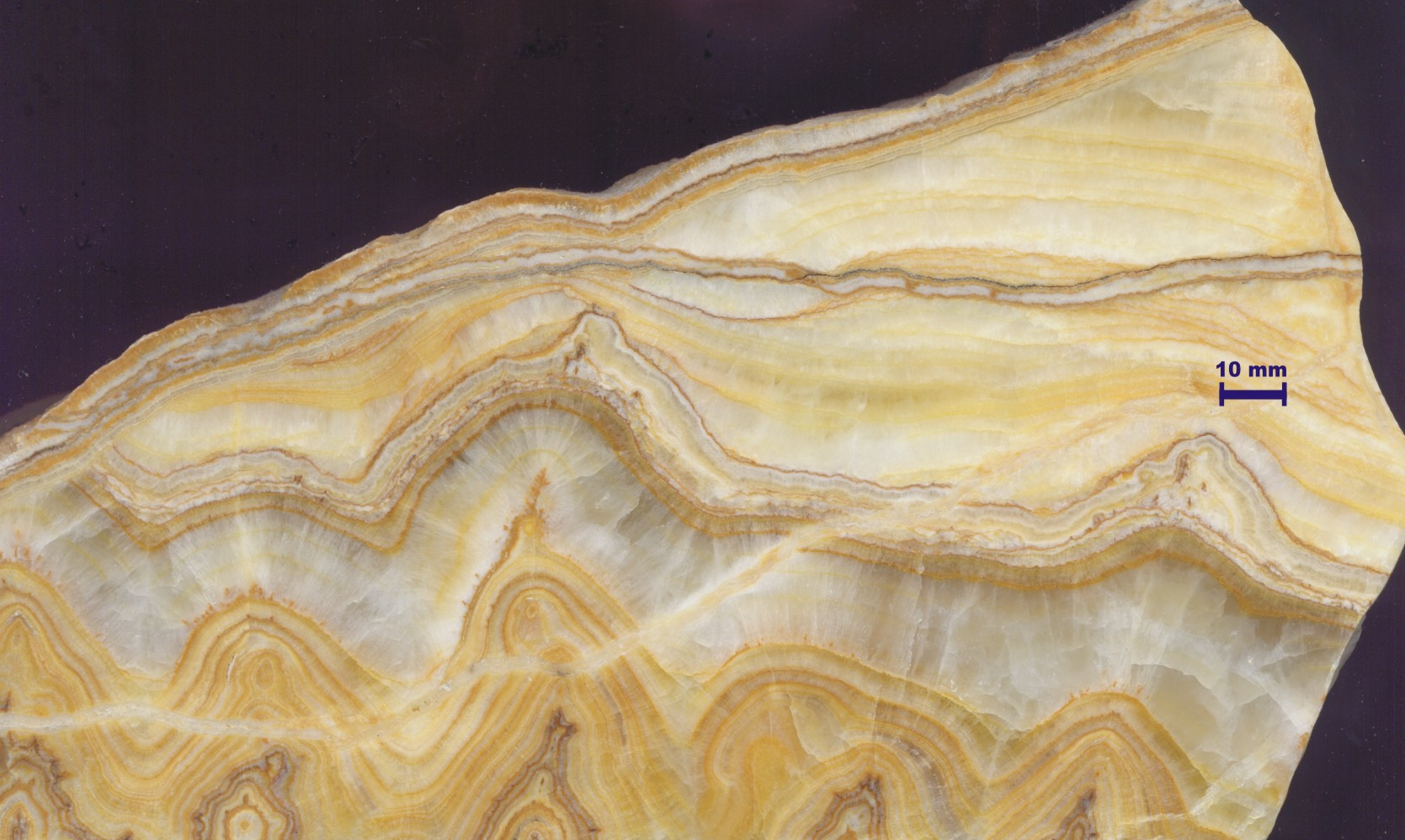 Sinterkalk (Laminationsgefüge)